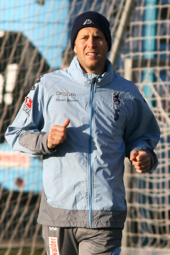 Gregg Berhalter, player of TSV 1860 München, training, 20.01.2007, Grünwalder Str., Munich